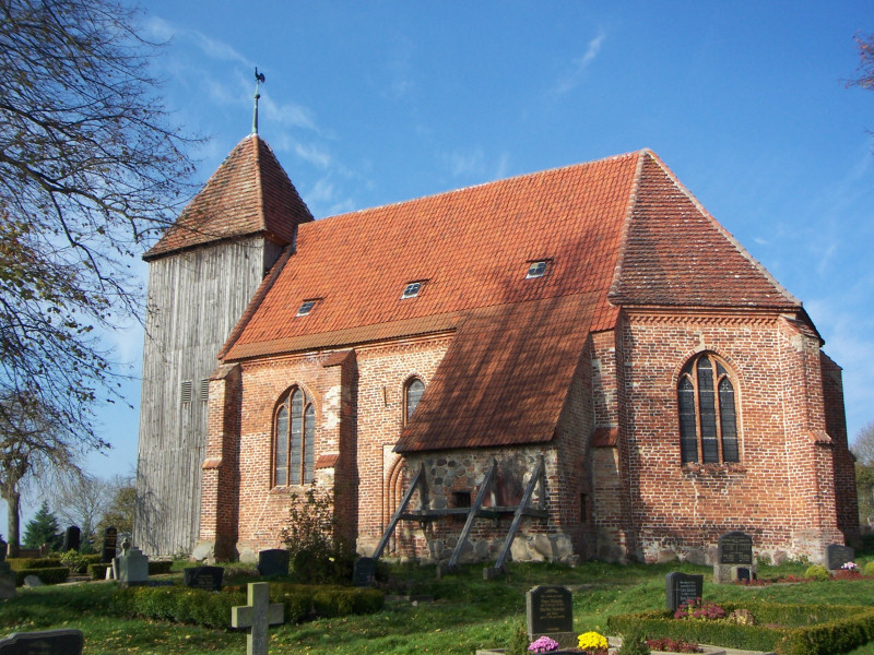 Kirche in Retschow, Mecklenburg-Vorpommern